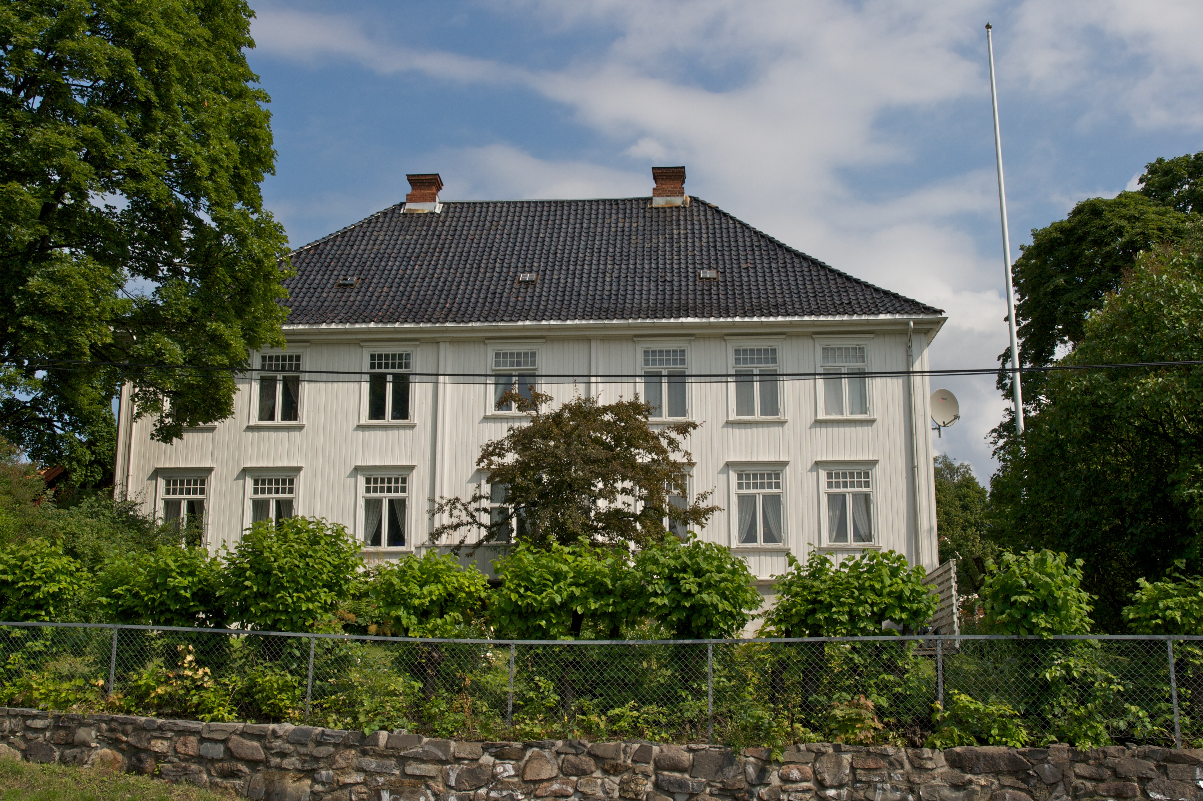 Nedre Blindern, Oslo.